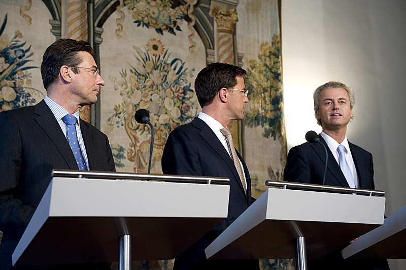 30/09/10: Fractievoorzitters Mark Rutte (VVD) en Maxime Verhagen (CDA) luisteren bij de presentatie van het regeer- en gedoogakkoord aandachtig naar PVV-fractievoorzitter Geert Wilders